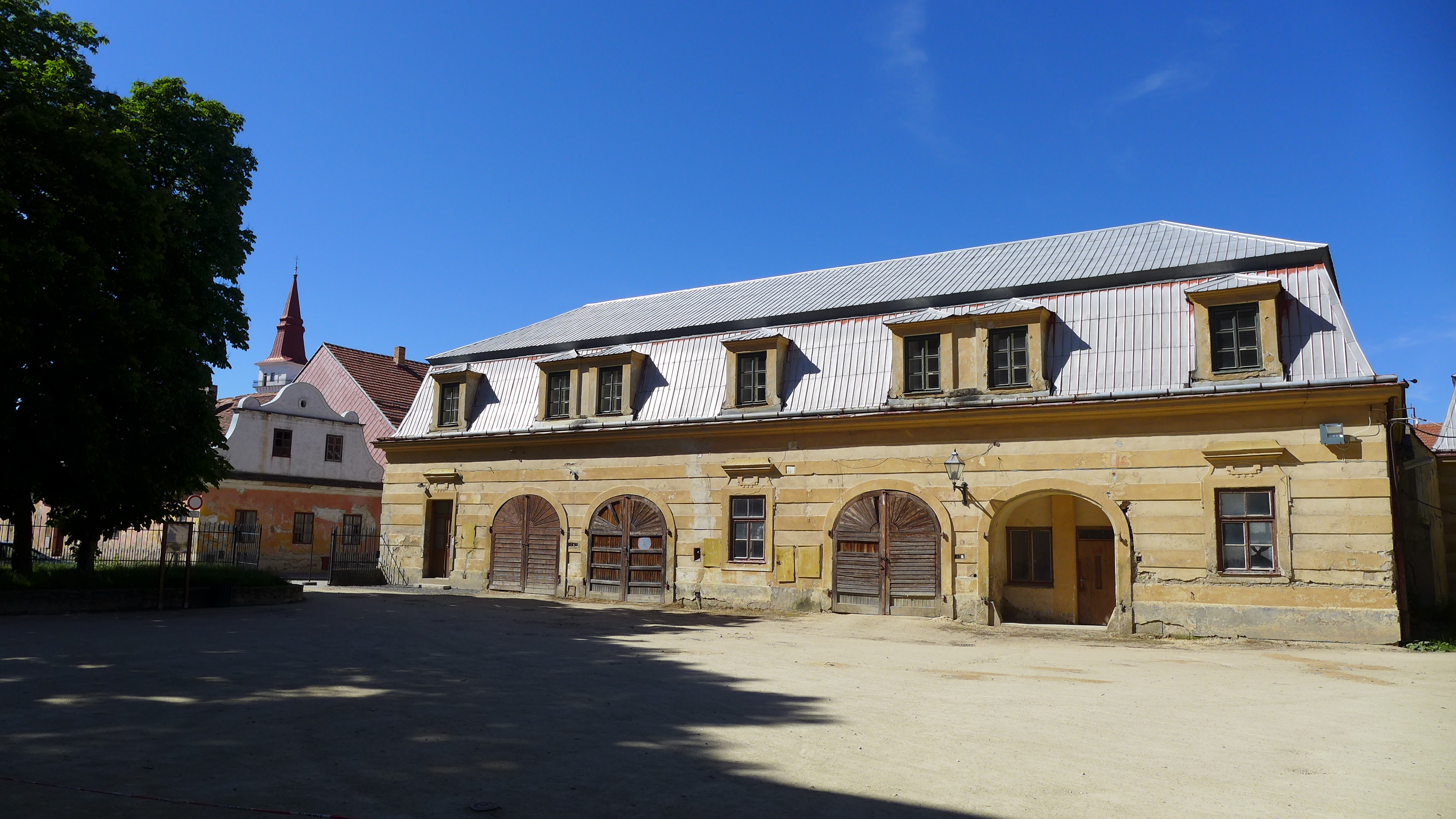 Zámek Jemnice s parky, Husova 1, 2, 3, Havlíčkovo náměstí 8, 47, Obůrka 174, Tyršova 622, 872